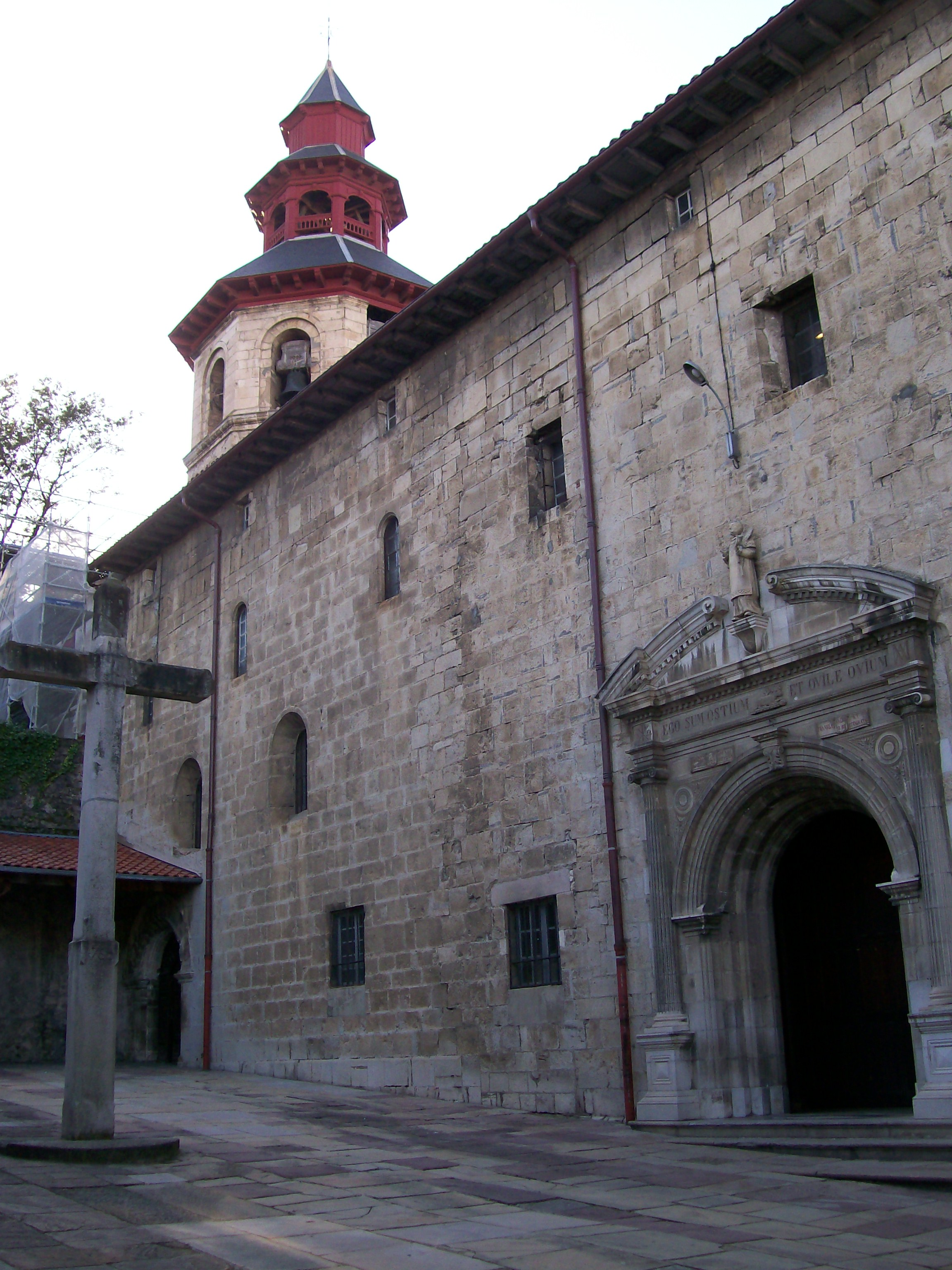 Ziburuko Done Bikendi eliza